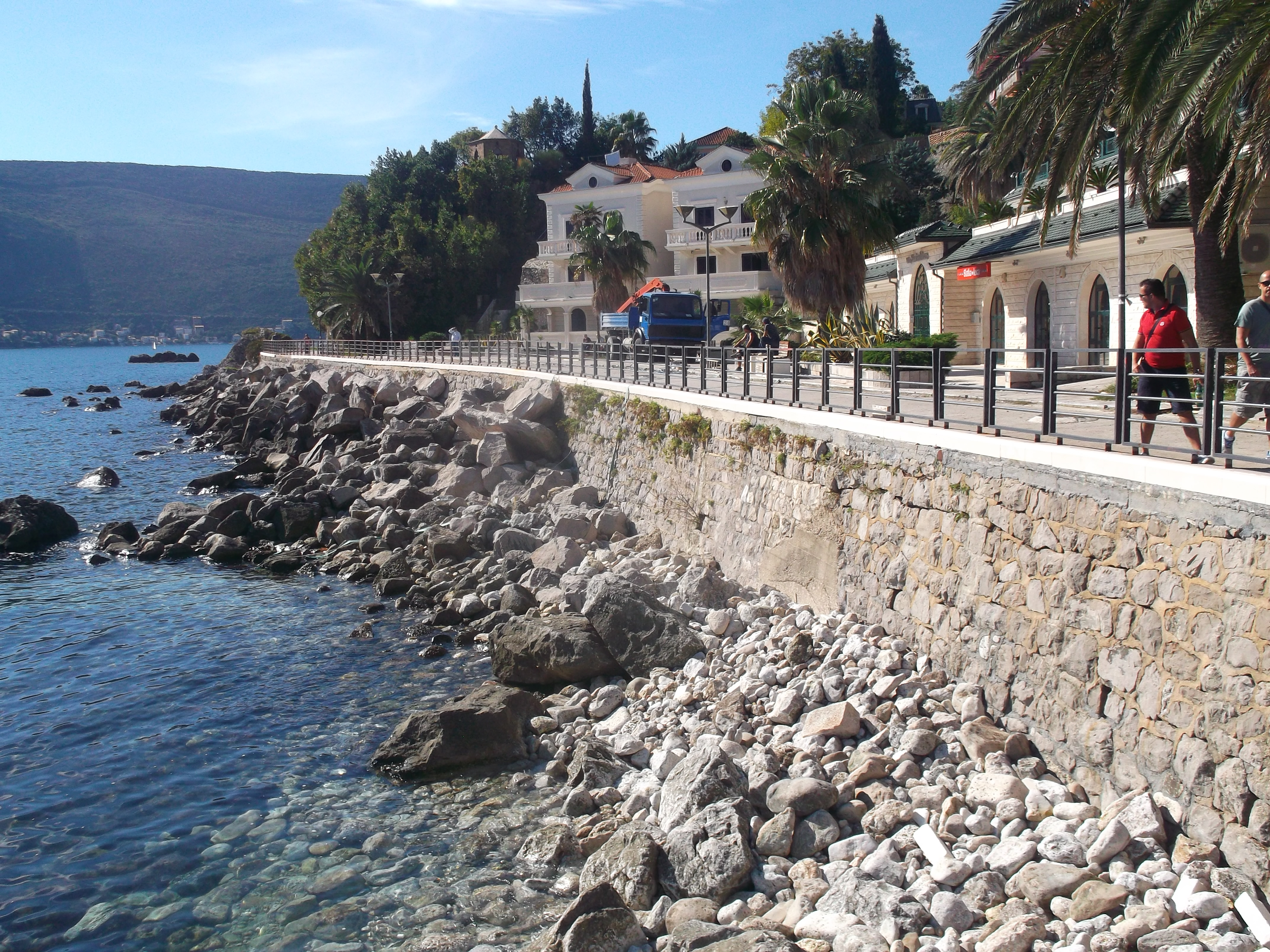 Šetalište Pet Danica, Herceg - Novi, Montenegro